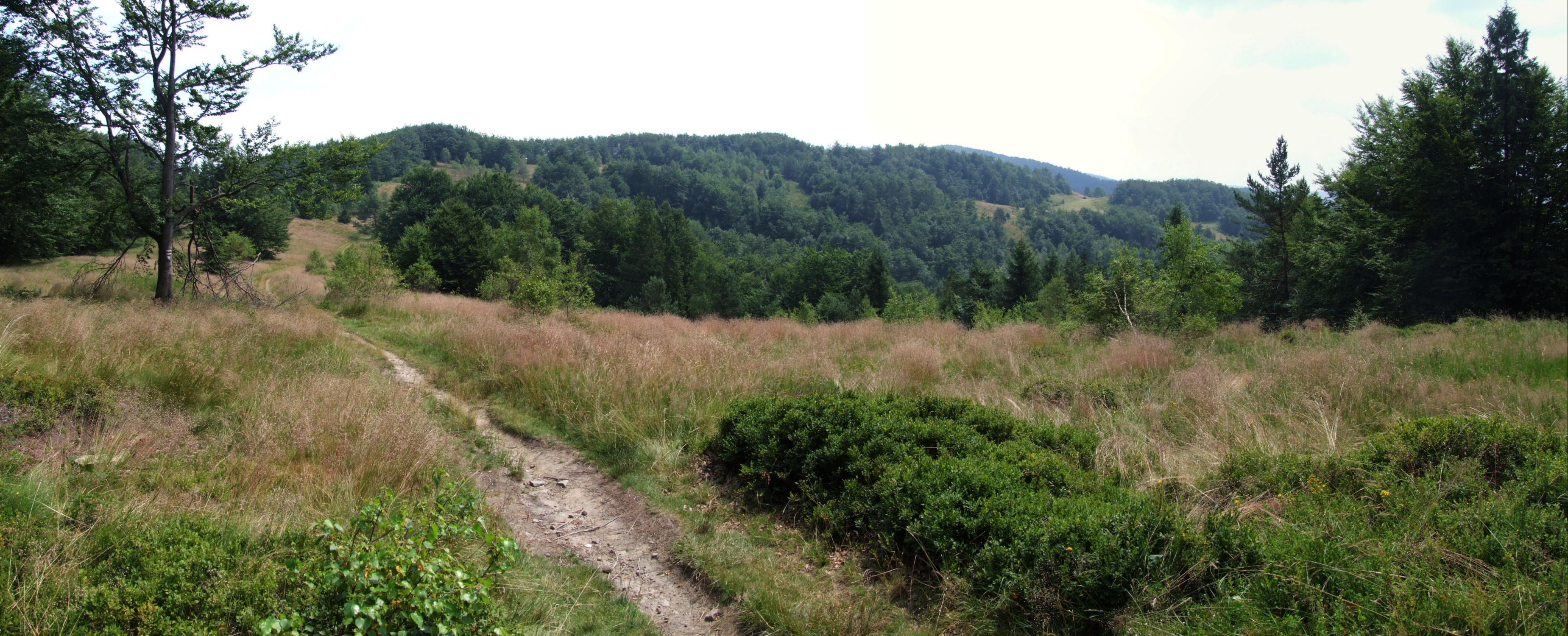 Hala Jaworzyna w Beskidzie Sadeckim. W głębi wierzchołek Jaworzyny Kokuszczańskiej